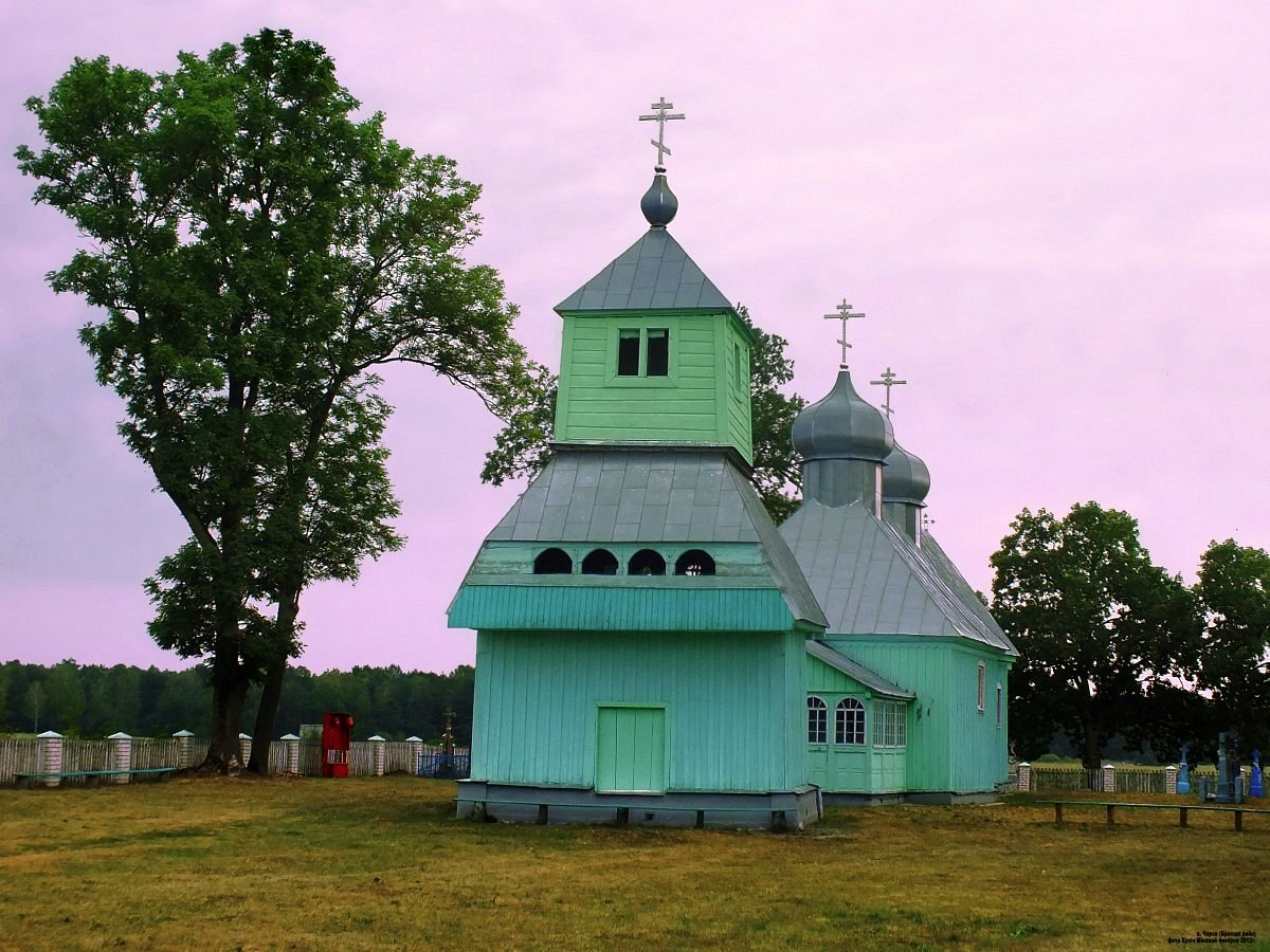 Чэрск. Свята-Міхайлаўская царква